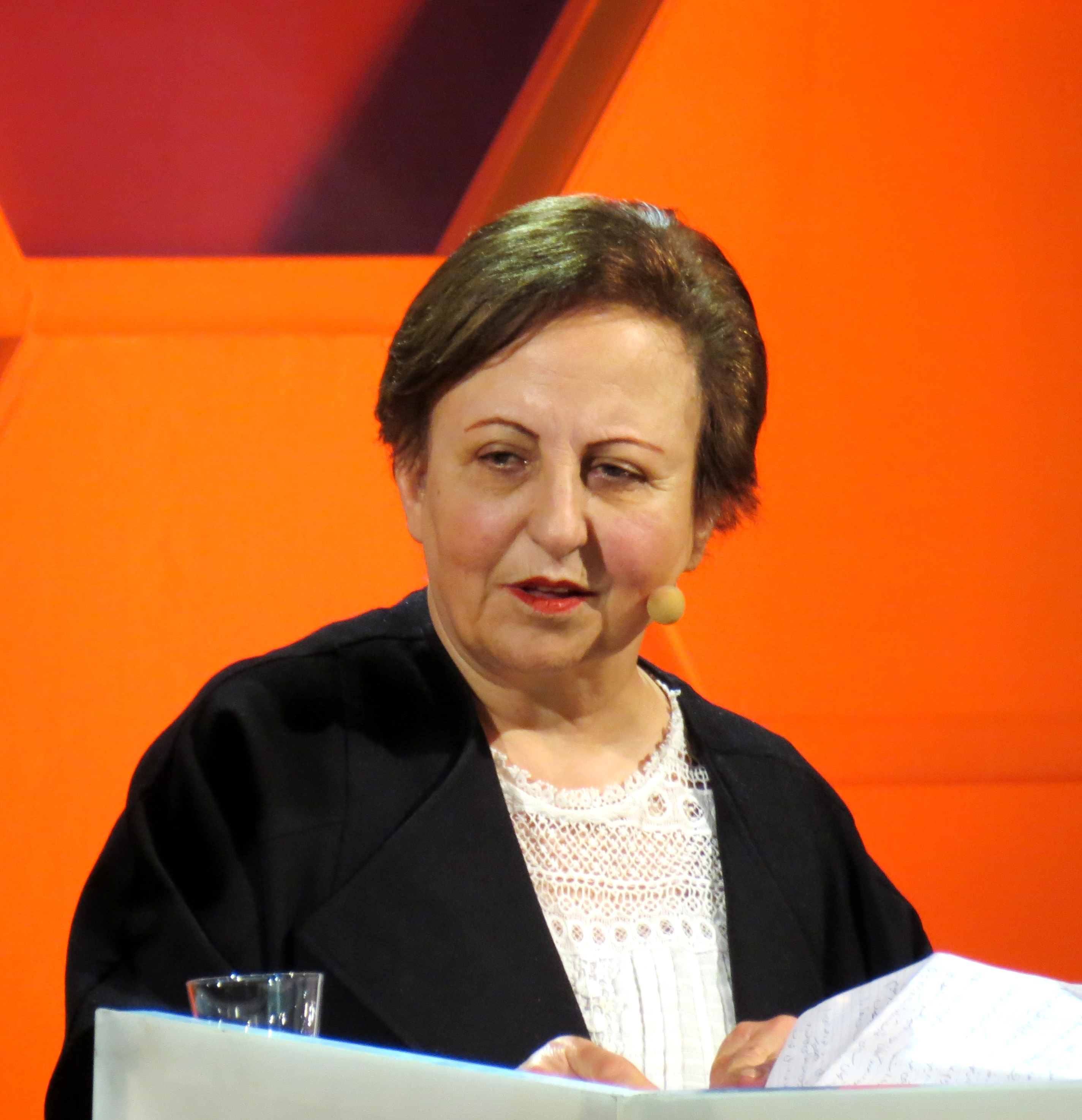 Shirin Ebadi speaking at Nobel Week Dialogue in Göteborg.